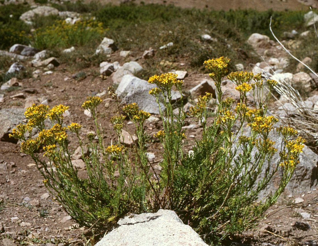 Senecio eruciformis, Korbblütler (Asteraceae) - Argentinien/Argentina, Paso de Uspallata, Puente del Inca, ca. 2700 m s.m. (Prov. Mendoza)